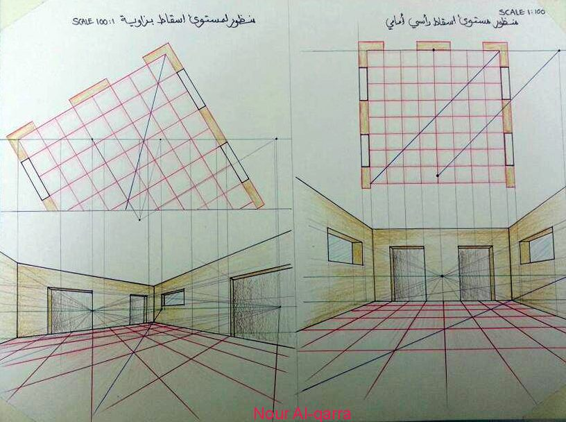 due tipi di prospettiva a quadro verticale